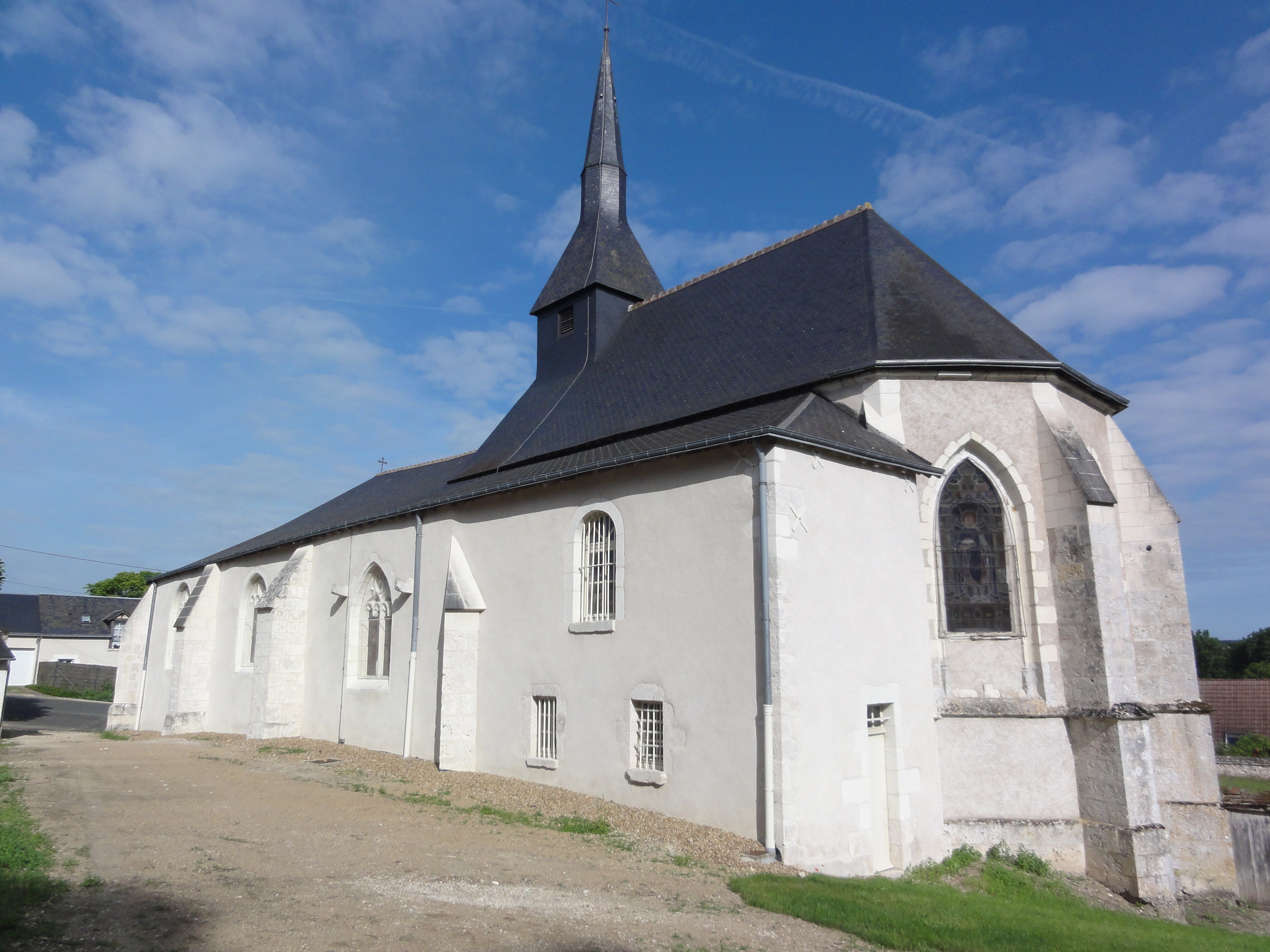 Chailles (Loir-et-Cher) église Saint-Martin